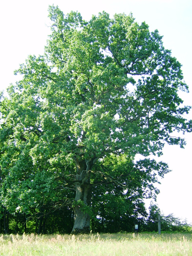 Andriejaičių Ąžuolas, kaimas Šilalės rajone